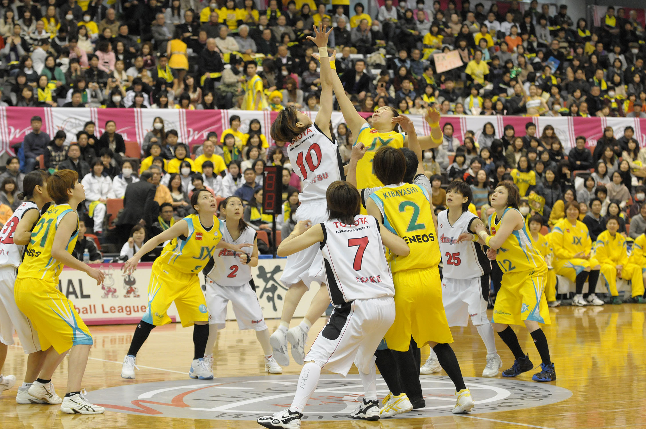 WJBL 11-12プレーオフファイナル、トヨタ対JX。船橋アリーナで。